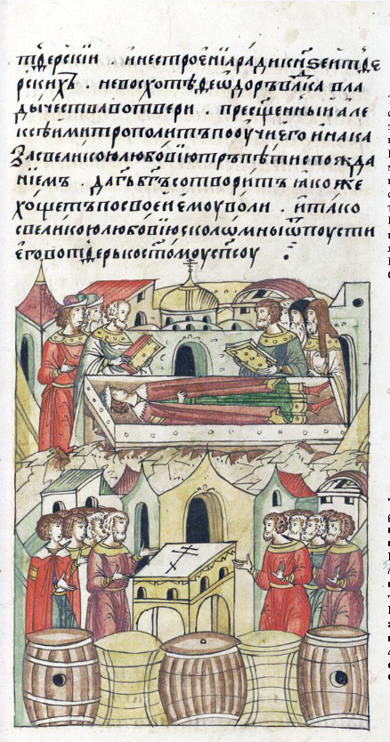 ЛИЦЕВОЙ ЛЕТОПИСНЫЙ СВОД В том же году преставился князь Иван Андреевич. В том же году новгородцы договорились между собой и крест целовали, что не будут терпеть игрищ бесовских и бить бочек.